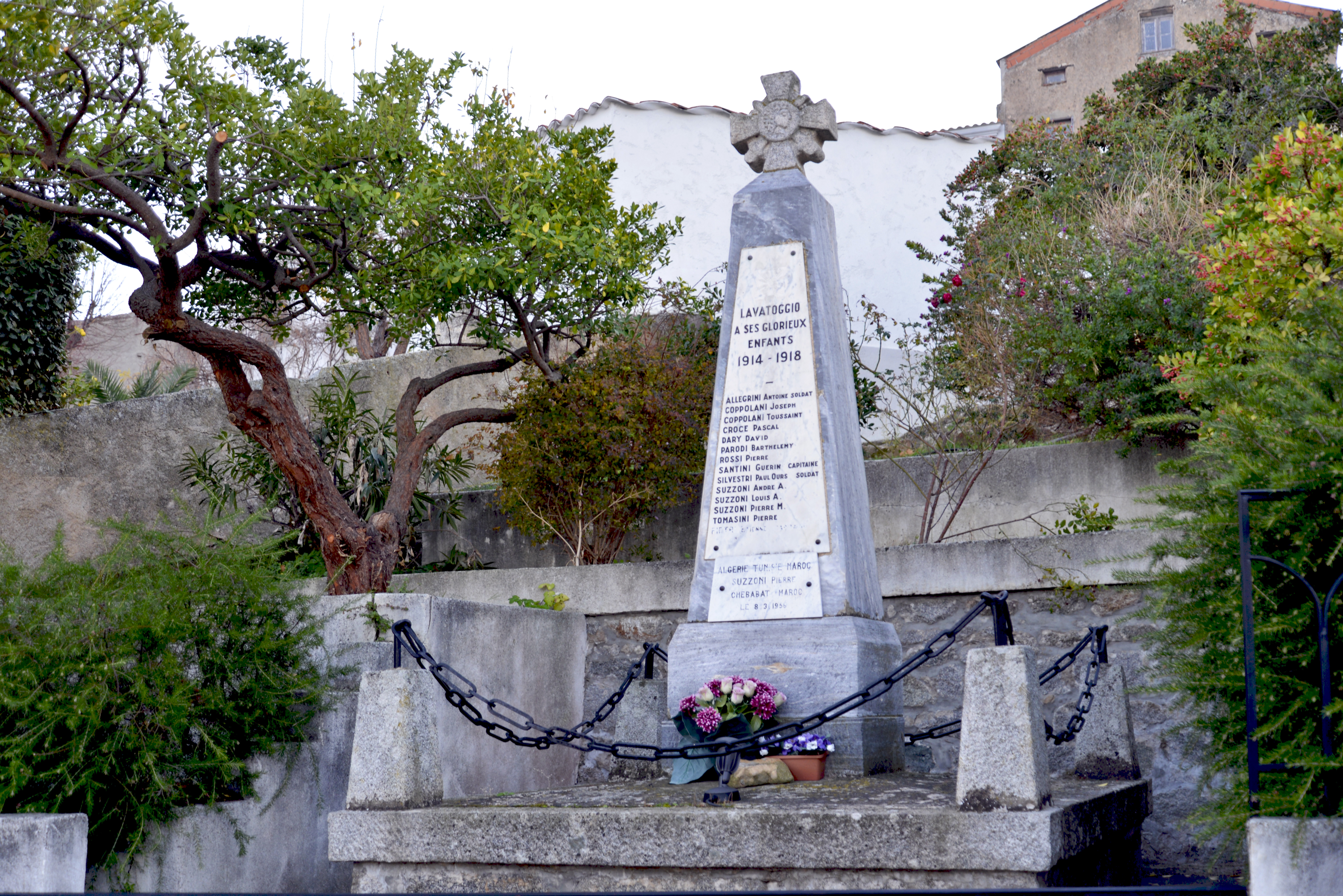 Lavatoggio, Balagne (Haute-Corse) - Monument aux morts.